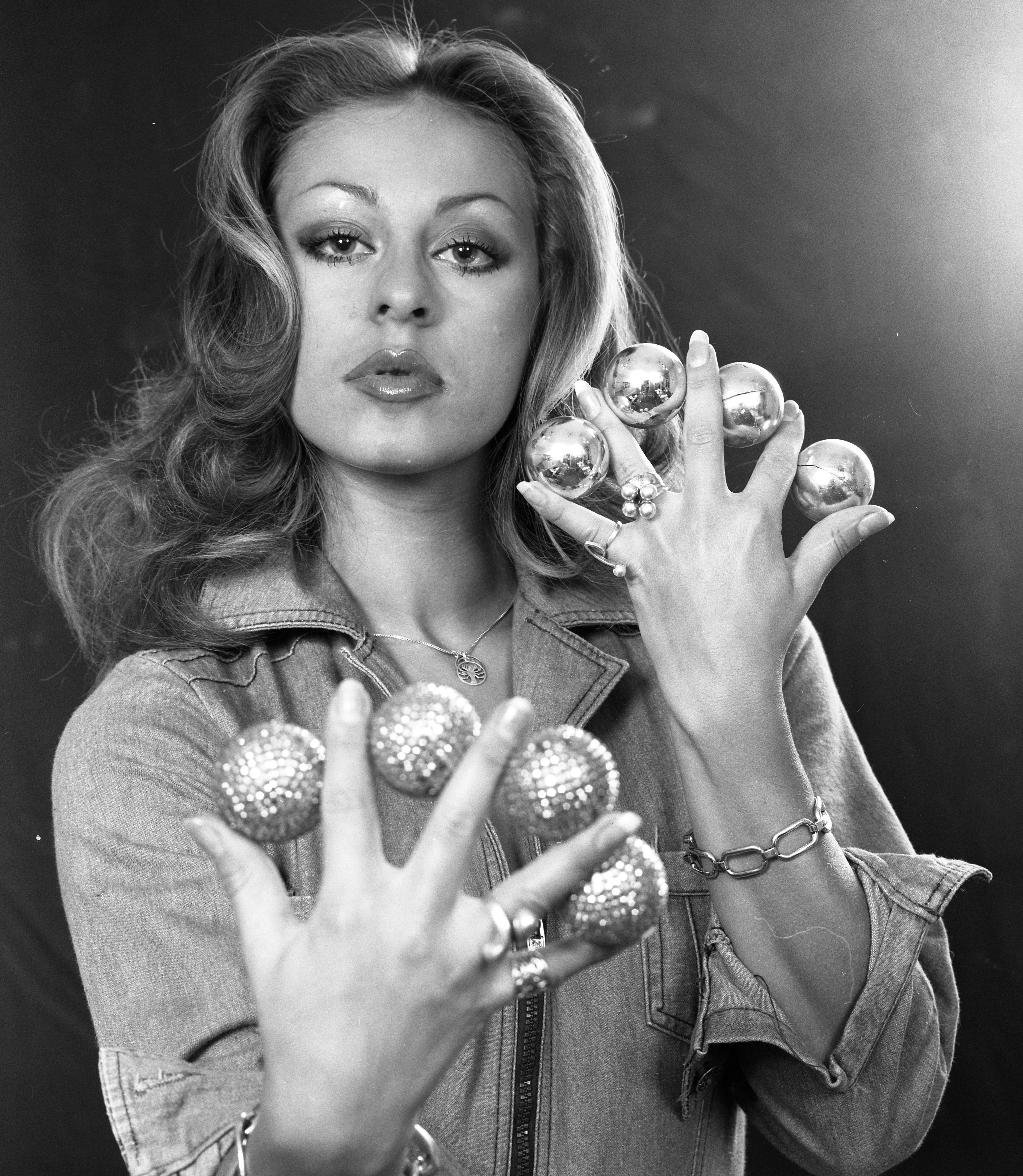 Ungár Anikó bűvész. Location: Hungary Title: Ungár Anikó bűvész.